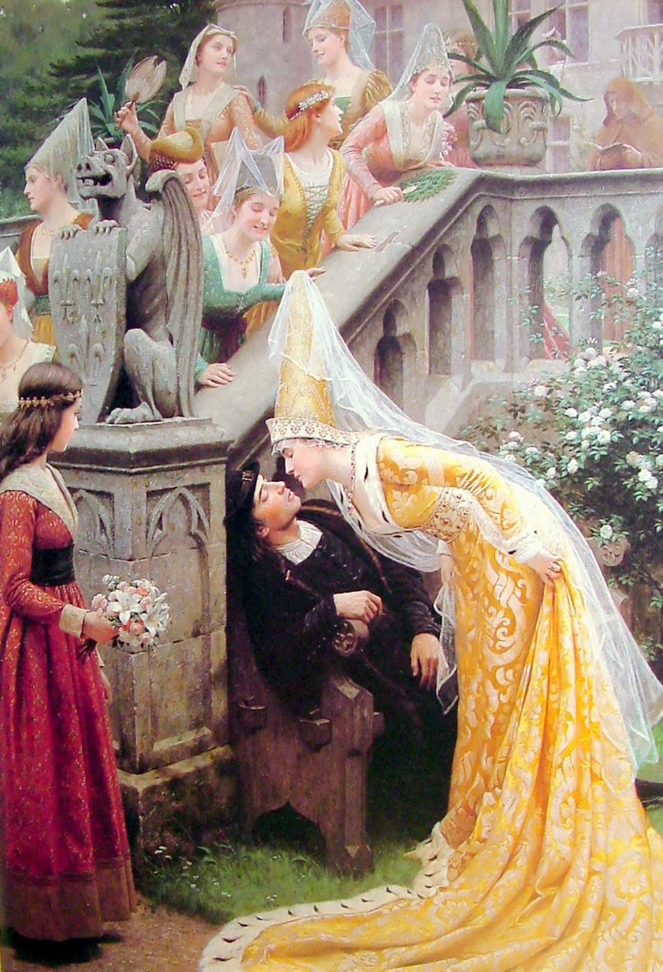 see LOT NOTES